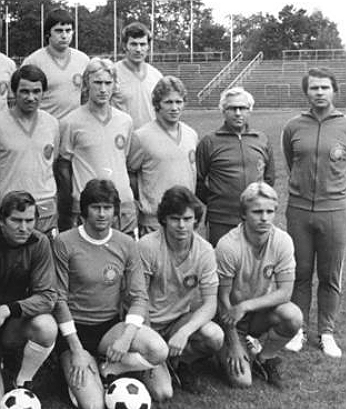 Title: Mannschaftsfoto 1. FC Lok Leipzig Factual corrections and alternative descriptions are encouraged separately from the original description. Additionally errors can be reported at this page to inform the Bundesarchiv. Original historic description: ADN-ZB-Kluge-26.7.78-ma-Leipzig: Die Fußball-Oberligamannschaft des 1. FC Lok Leipzig. Hintere Reihe von links: Thomas Dennstedt, Joachim Fritsche, Günter Sekora, Hans-Jürgen Kinne, Udo Rietzschel, Volker Grossmann und Wolfram Löwe. Mittlere Reihe von links: Trainer Heinz Joerk, Wolfgang Altmann, Karl-Heinz Herrmann, Wilfried Gröbner, Roland Hammer, Henning Frnezel, Mathias Liebers, Lutz Eichhorn, Masseur Helmut Burkhardt und Assistenztrainer Bernd Kirsche. Vorn von links: Andreas Roth, Andreas Bornschein, Rene Müller, Siegfried Stötzner, Werner Friese, Lutz Moldt und Dieter Kühn. (nicht im Bild der Spieler Kreer).